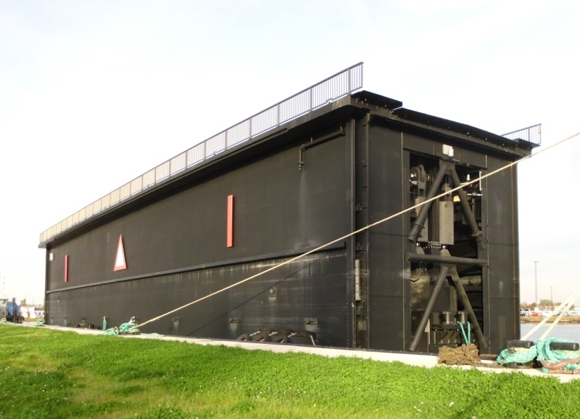 Docktor (Reserve) der neuen Kaiserschleuse in Bremerhaven